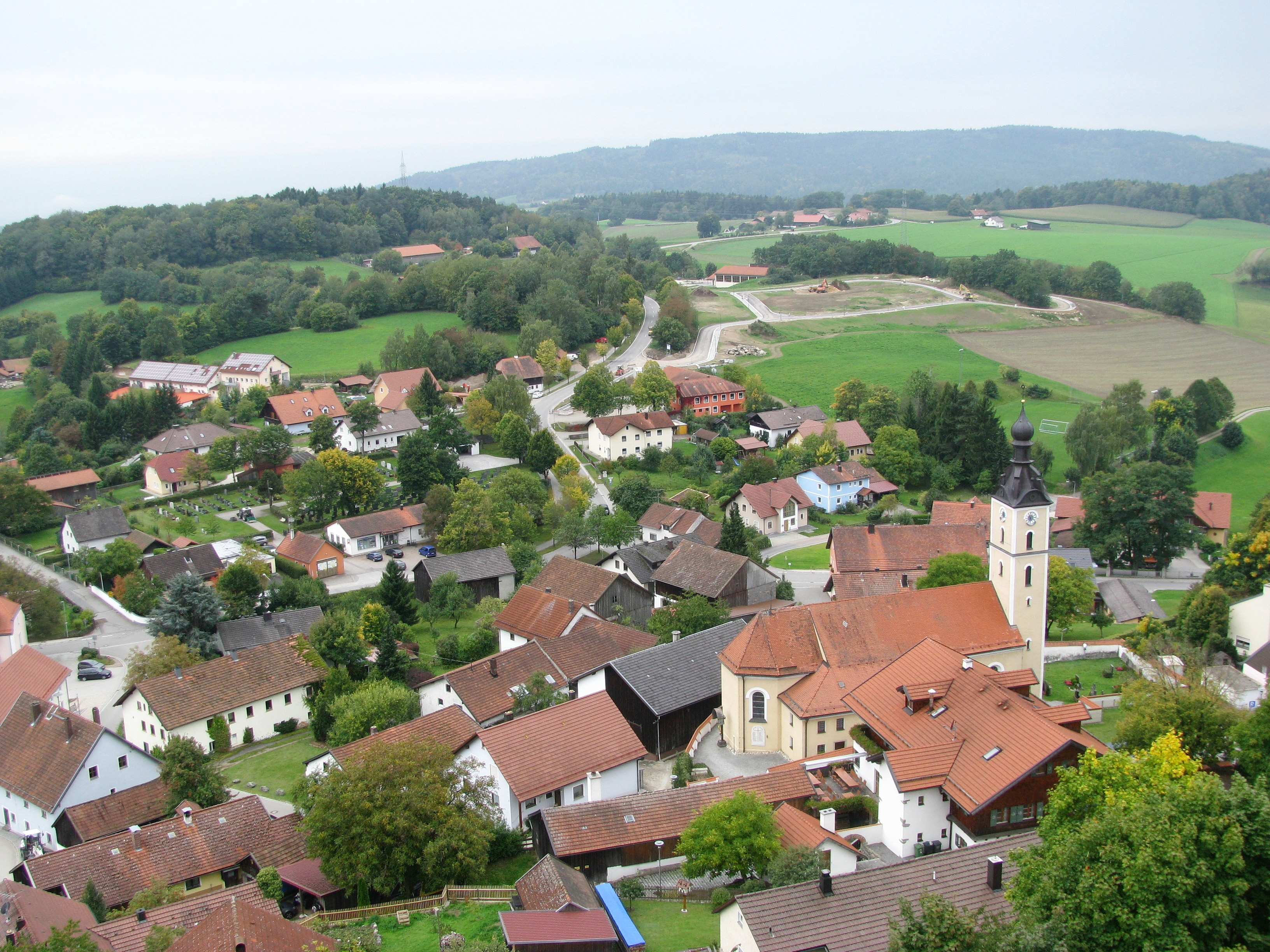 Brennberg gesehen vom Turm der Ruine Brennberg